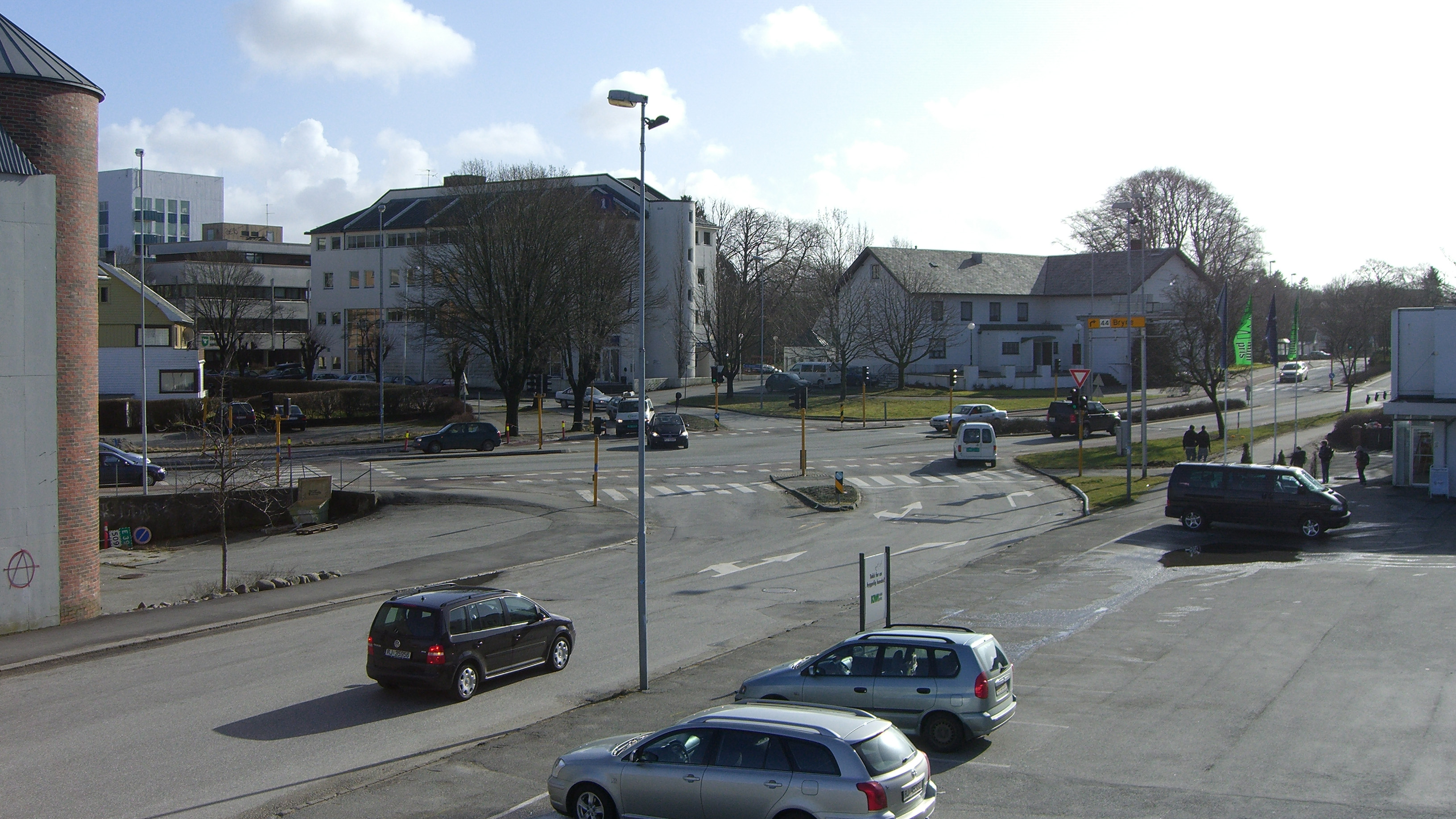 Skeiene in Sandnes, Norway